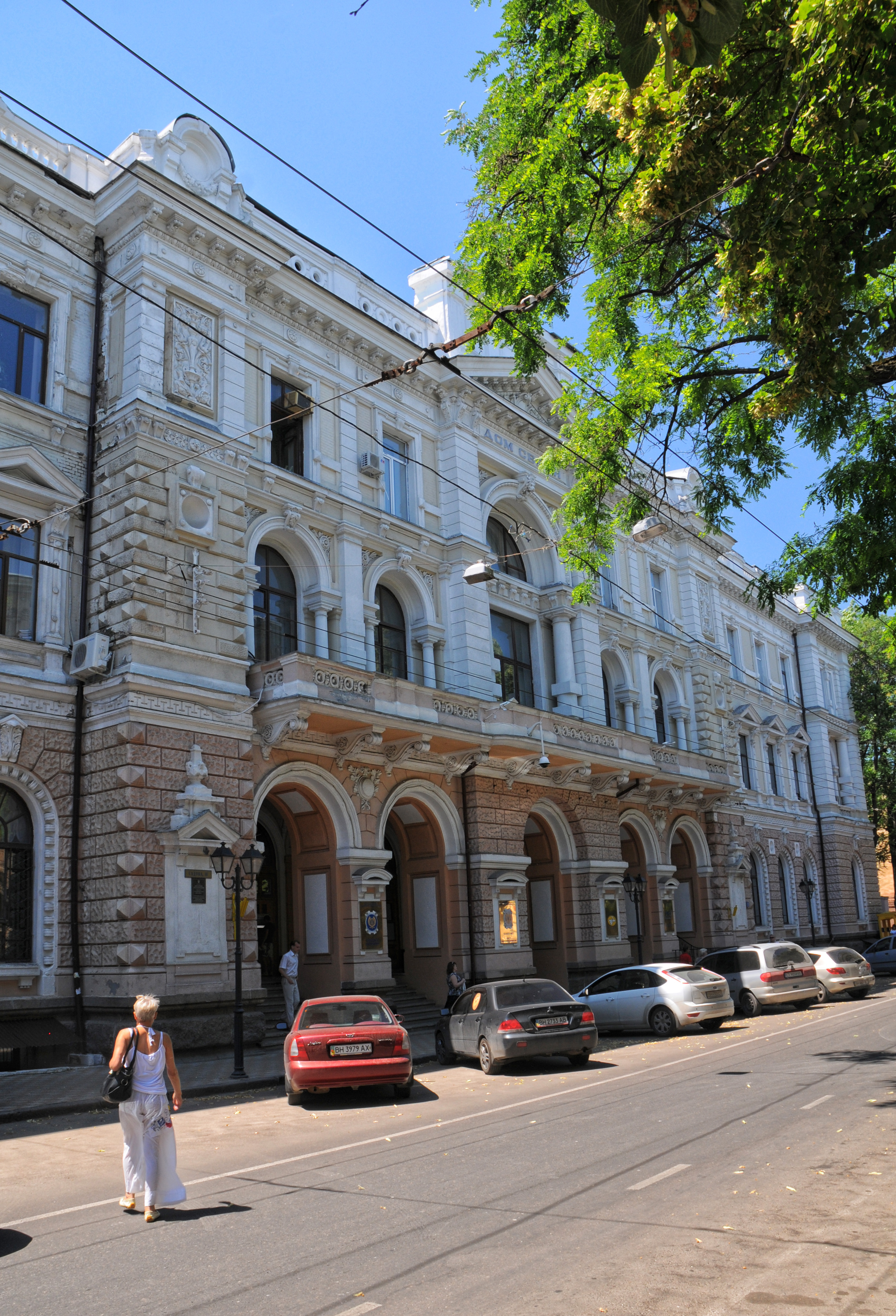 Одеса, Садова, 10 Головпоштампт